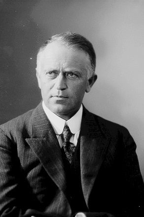 Viggo Brun, norsk matematiker.